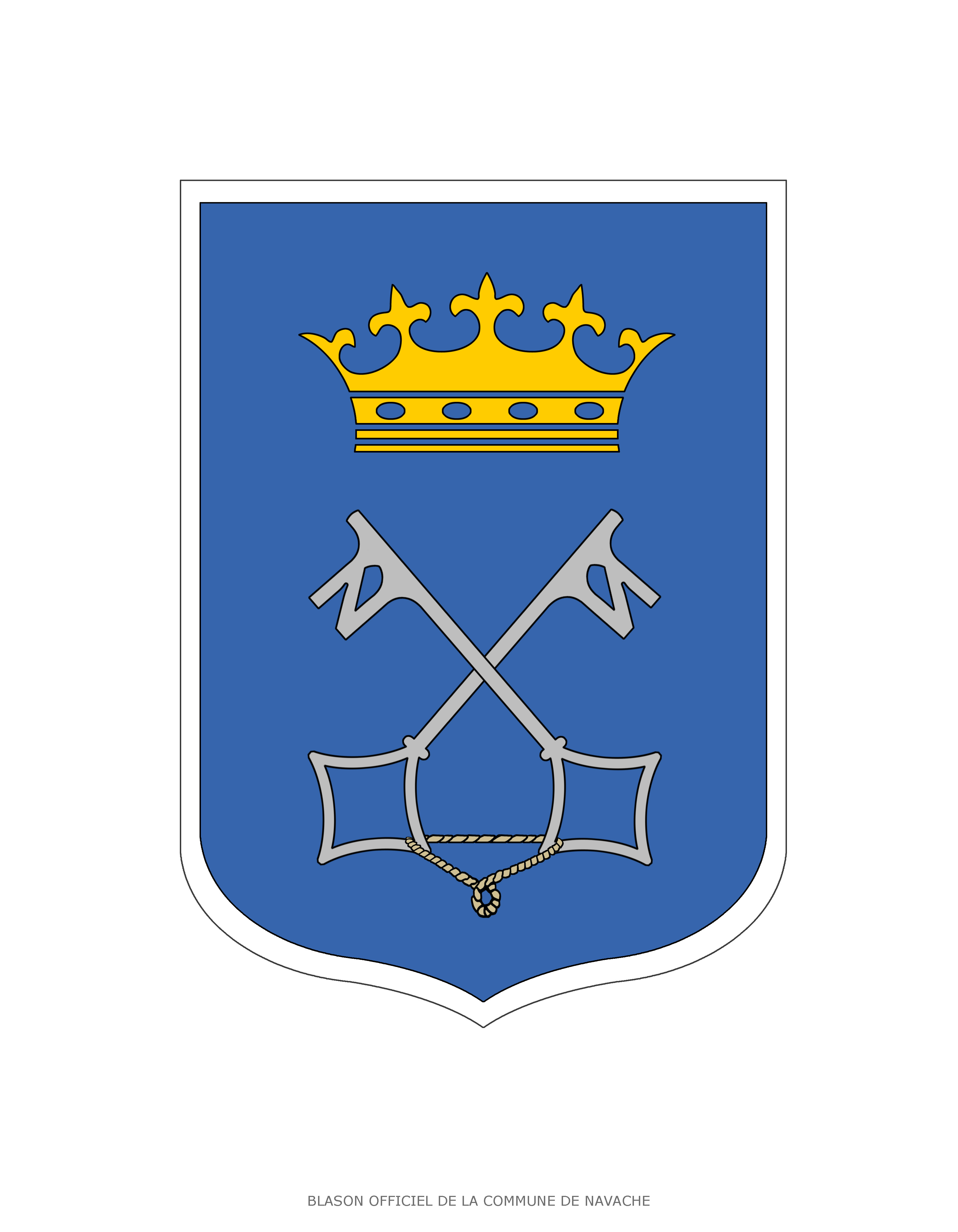 Blason officiel de la Commune de Névache ( Hautes Alpes - France )